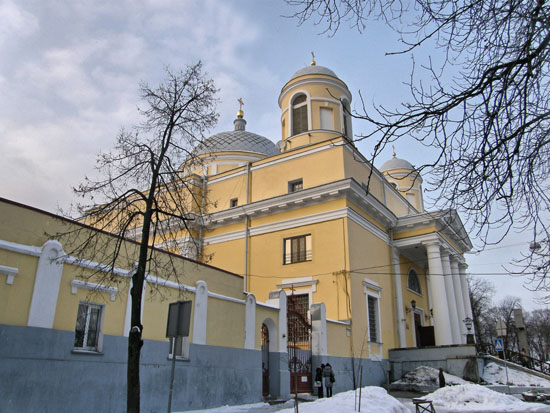 Костьол Святого Олександра: Костьол Святого Олександра, сучасний стан